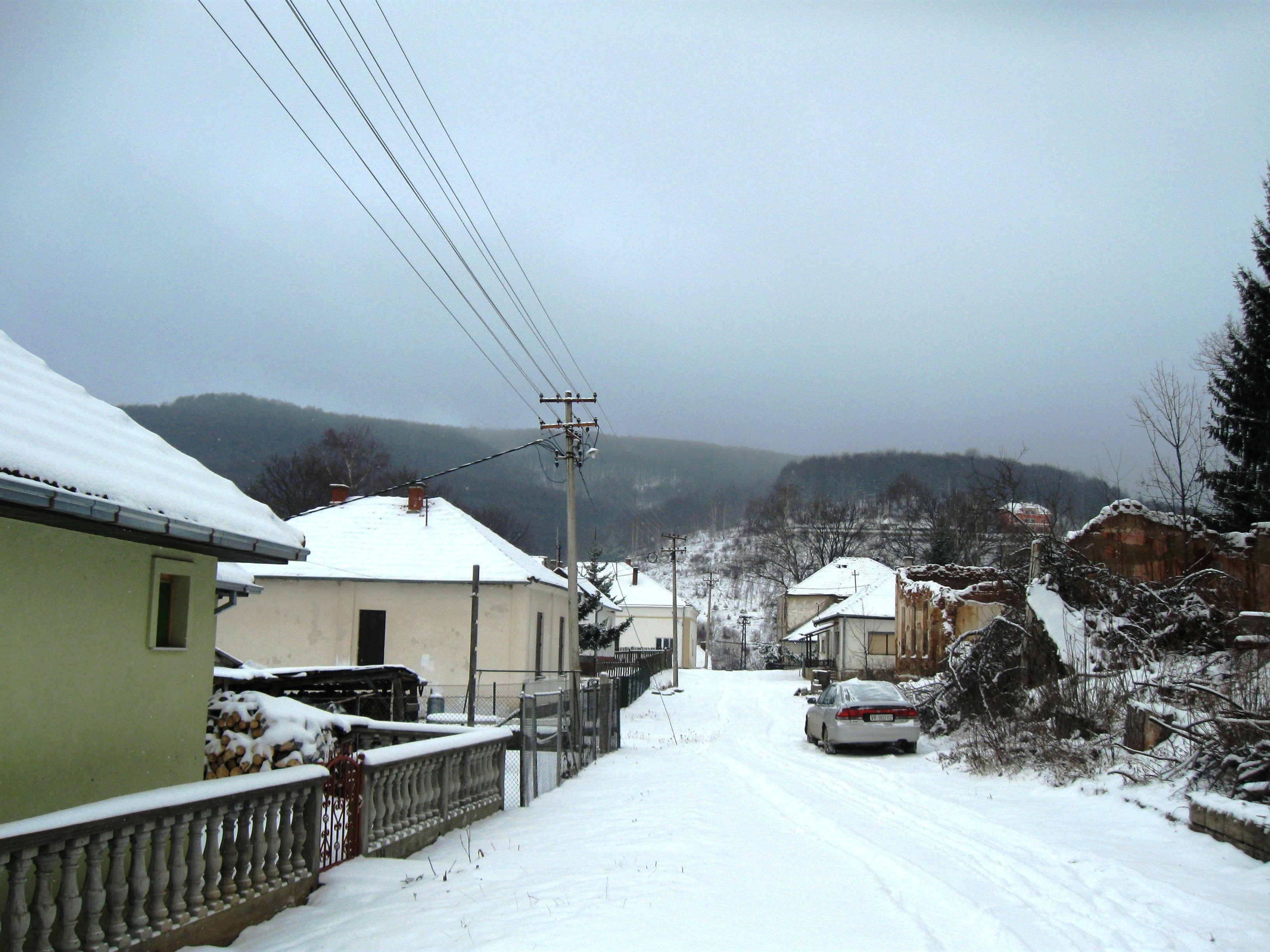 аутор: Радосав Стојановић